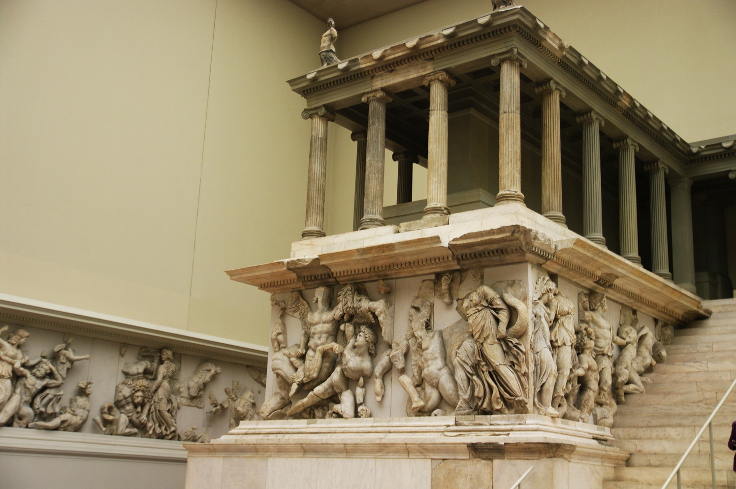 Pergamon-Museum, Detail Pergamon-Altar